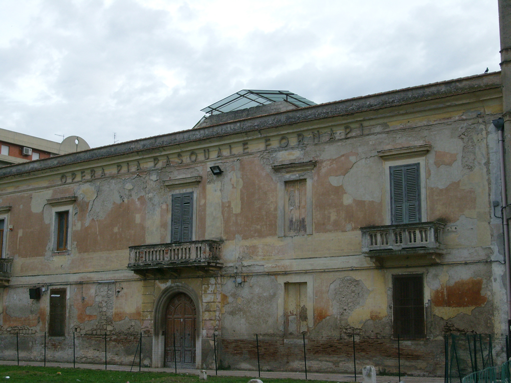 Facciata dell'ex Opera Pia Monte Fornari di Cerignola (FG).